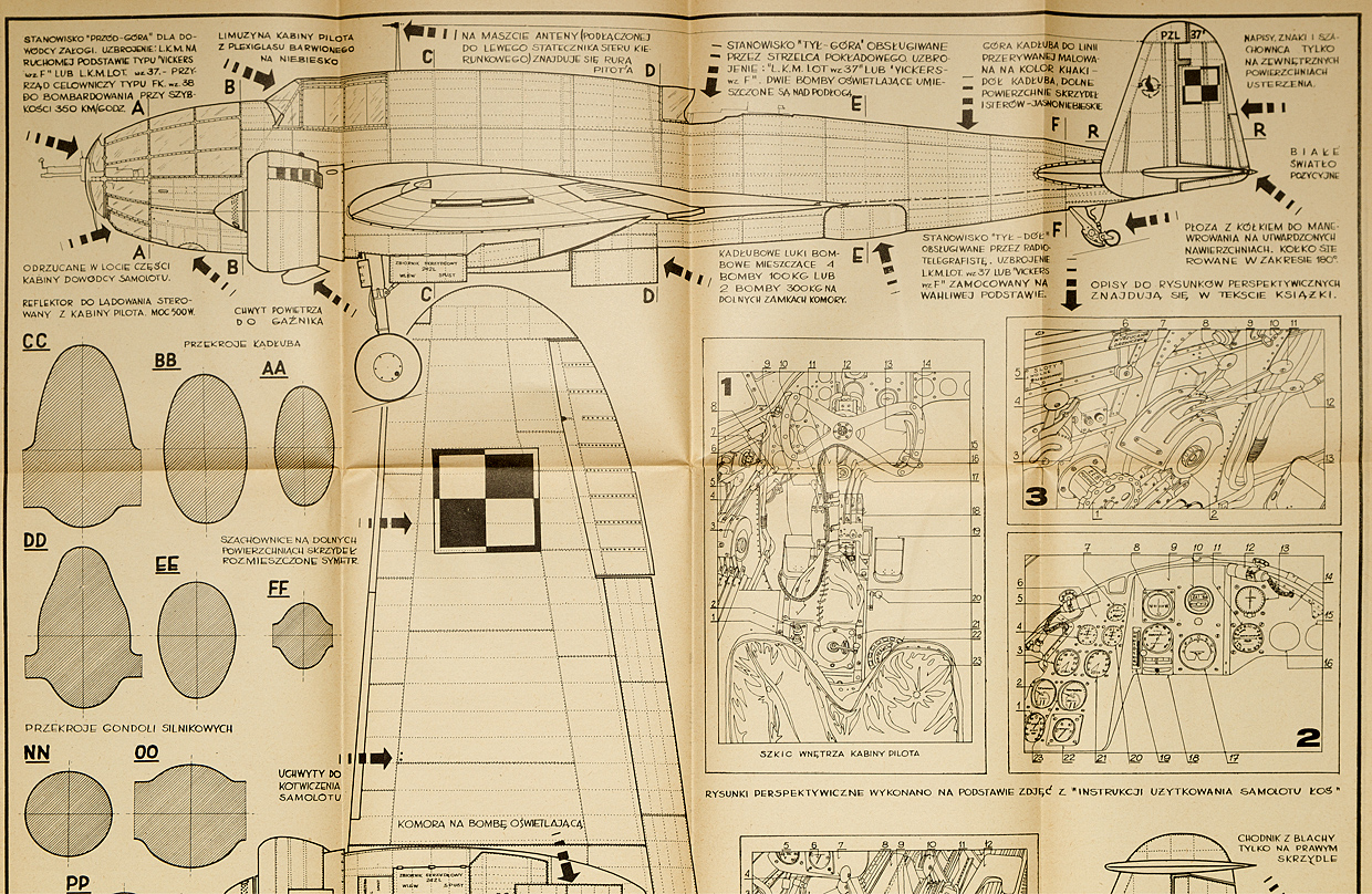 Fragment rysunku samolotu PZL-37B Łoś autorstwa Andrzeja A. Mroczka, zamieszczonego kilkadziesiąt lat temu w miesięczniku Modelarz. Na jego podstawie zbudowano niedawno model samolotu PZL-37B Łoś w skali 1:1. Rysunek pochodzi z artykułu "Samolot bombowy PZL-37 Łoś" autorstwa pana Andrzeja A.Mroczka, zamieszczonego w czasopiśmie modelarskim Modelarz numer 9/1958 r. (strony 13-16).